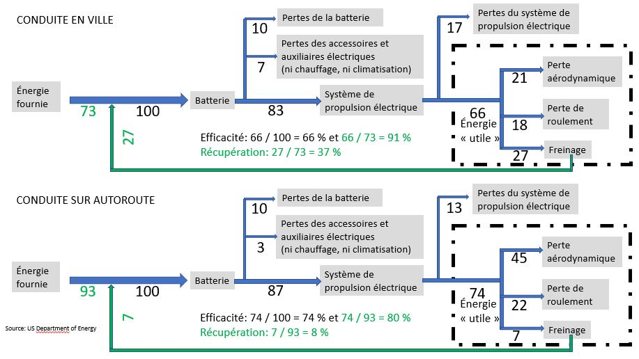 Ce diagramme montre les flux d'énergie dans une voiture électrique avec et sans récupération La source du diagramme est à trouver ici